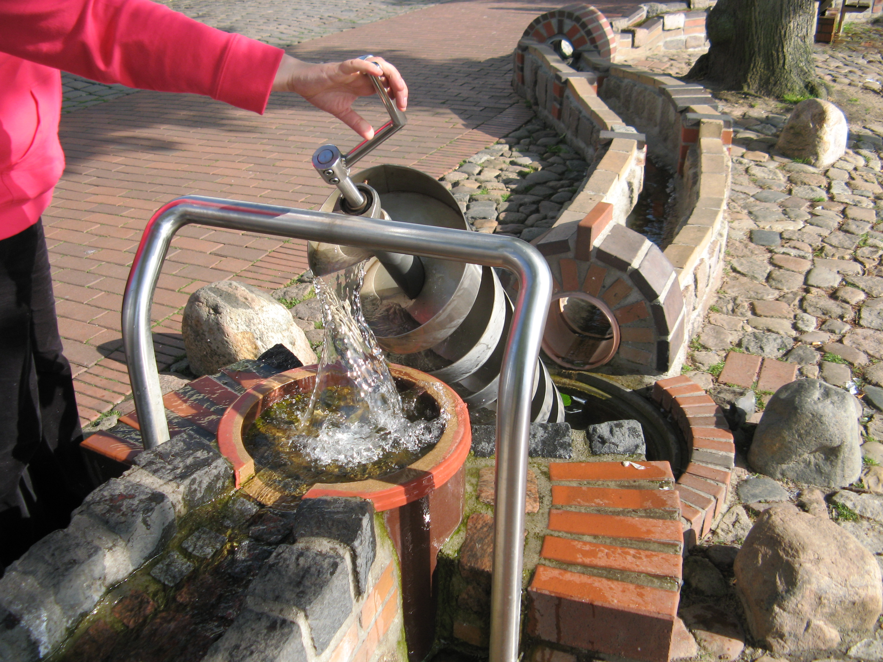 Archimedische Schraube am Heider Marktplatz